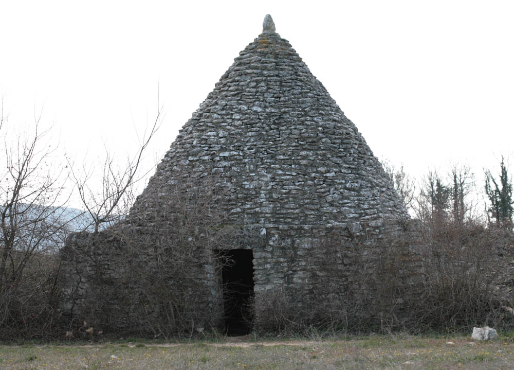 Borie on "le plateau des Claparedes" in Bonnieux, France